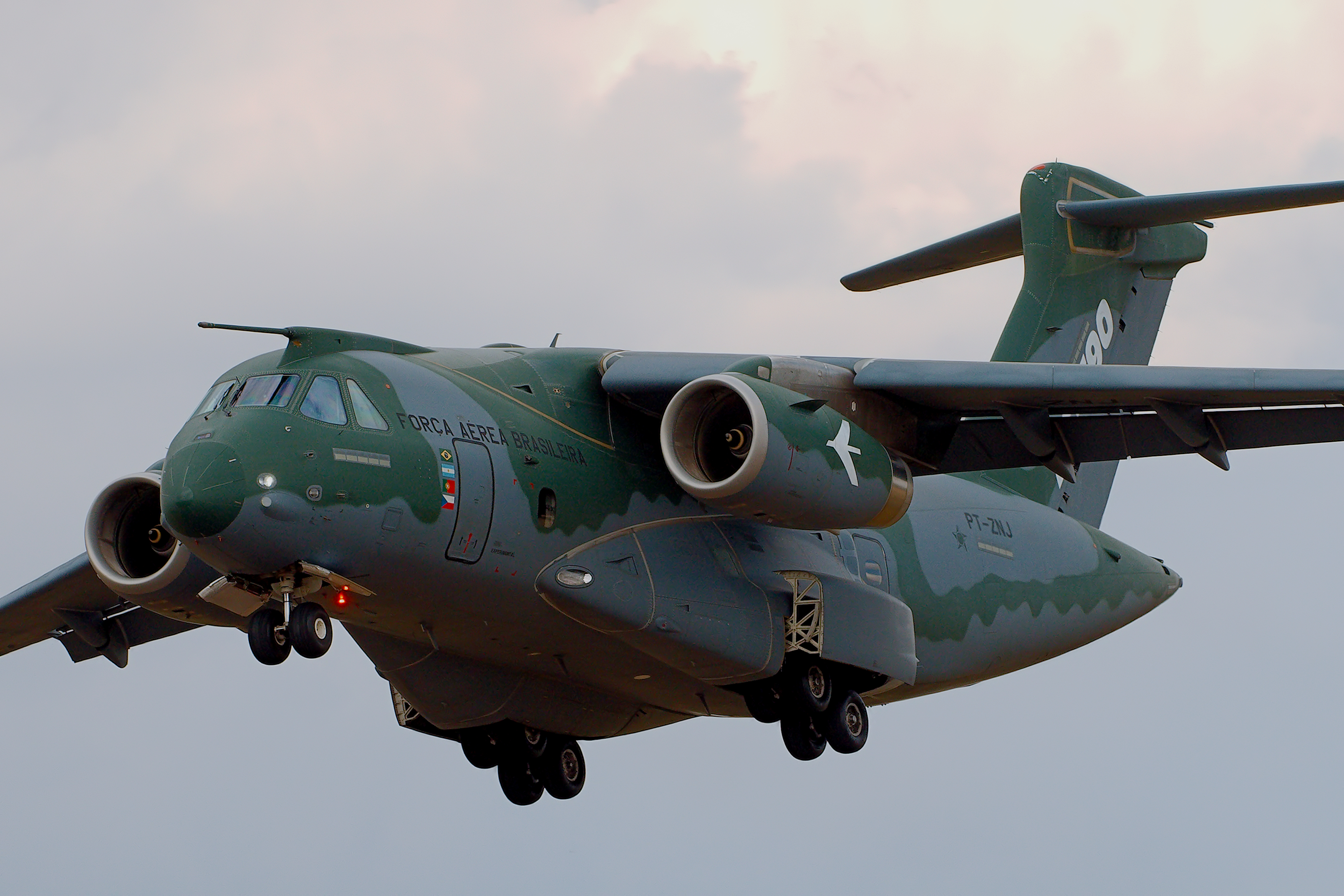 KC390 - RIAT 2018